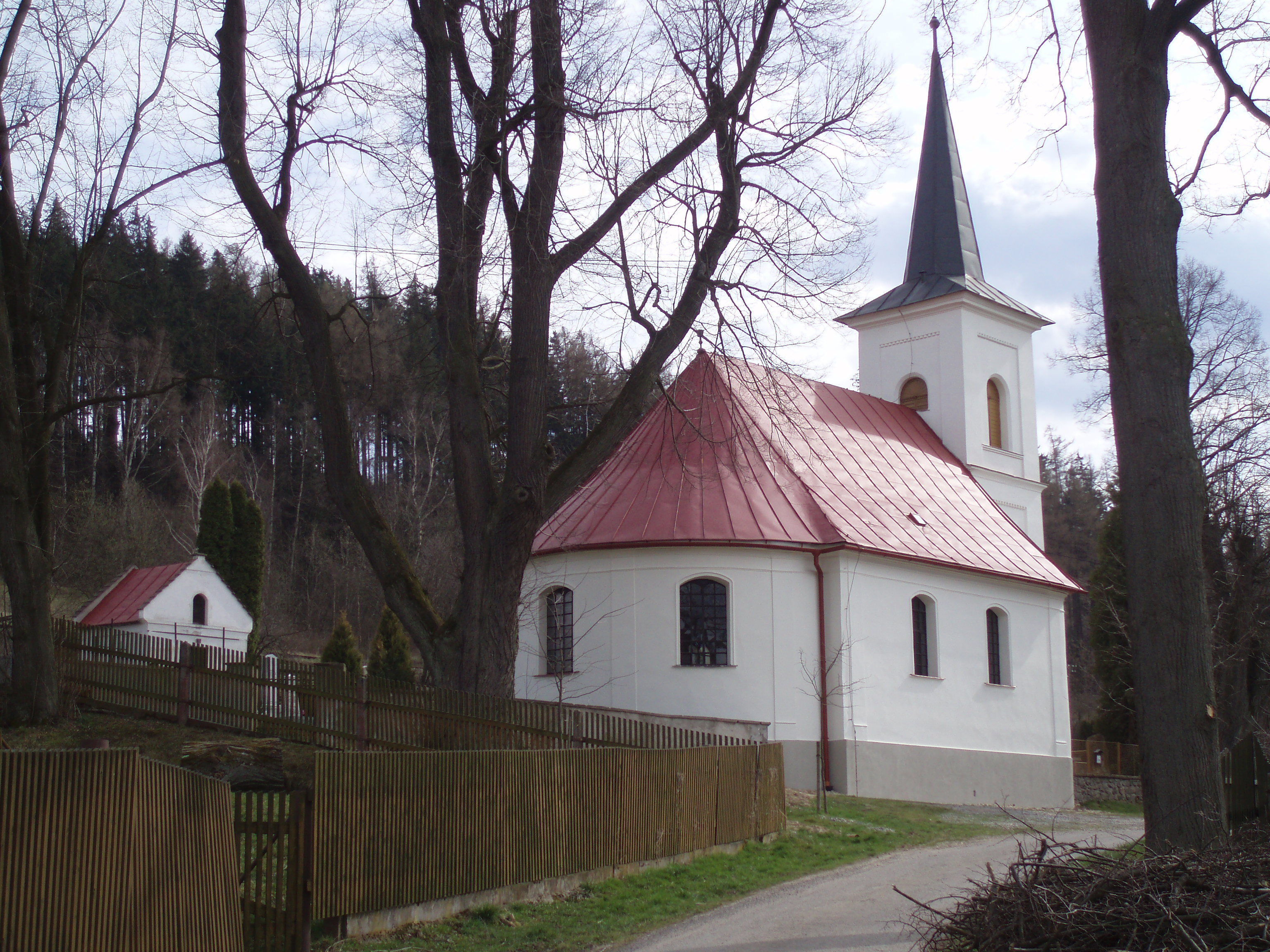 Evangelický kostel v Sázavě, okres Žďár nad Sázavou, Vysočina region, Czech republic